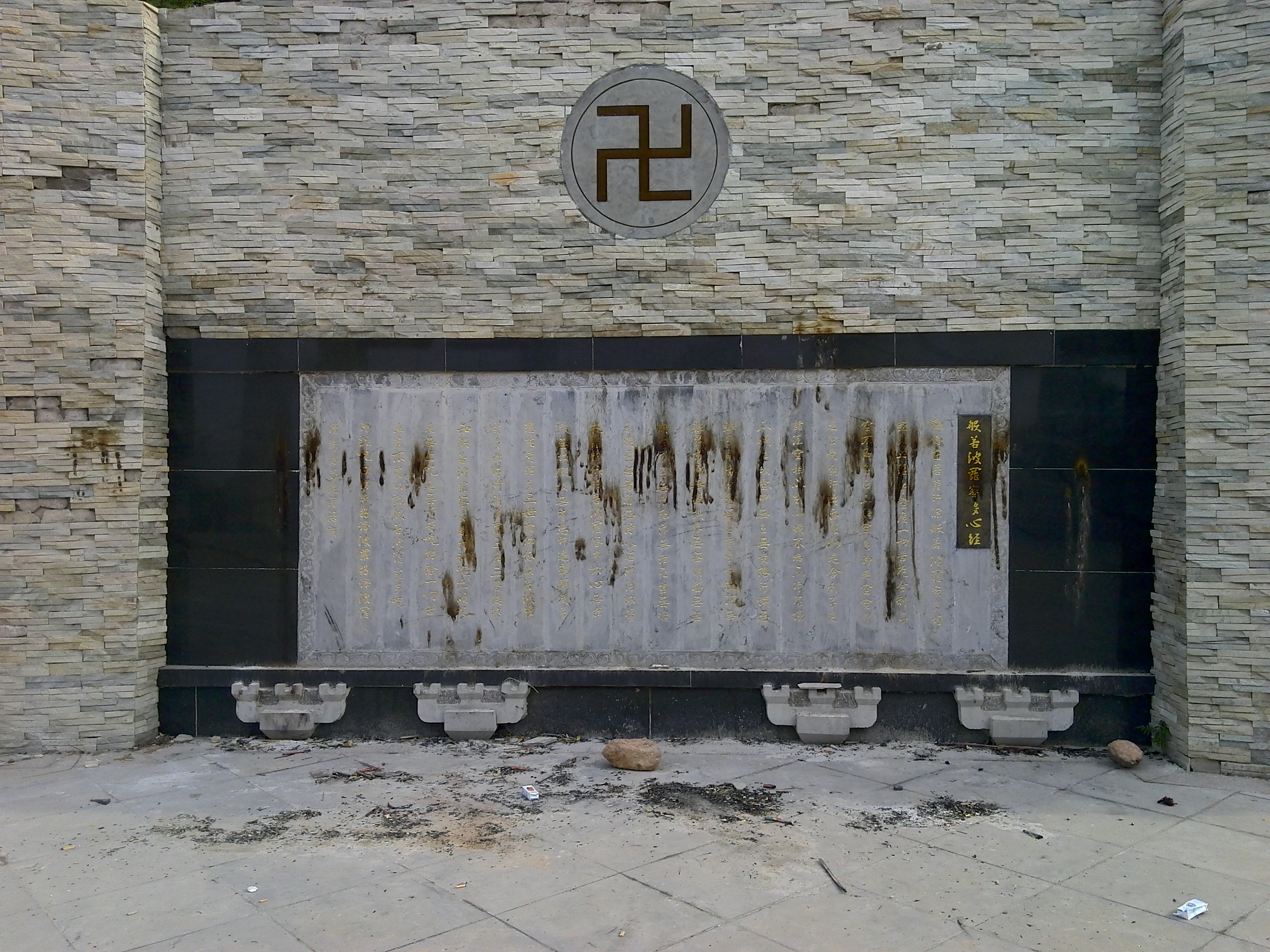 中文（中国大陆）: 白佛山景区碑文